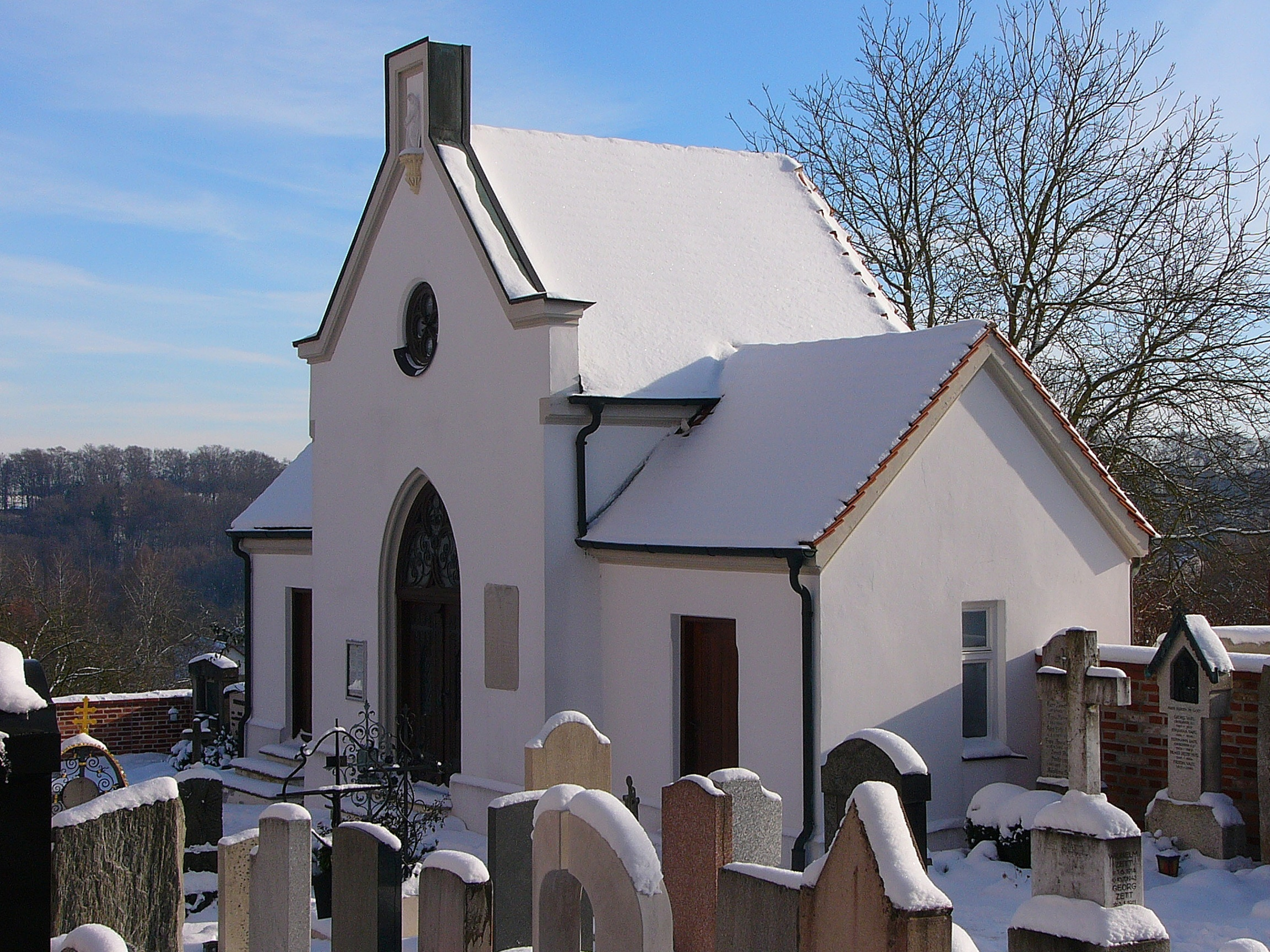 Kath. Pfarrkirche Hl. Blut; Leichenhalle, 2. Hälfte 19. Jh.This is a photograph of an architectural monument.